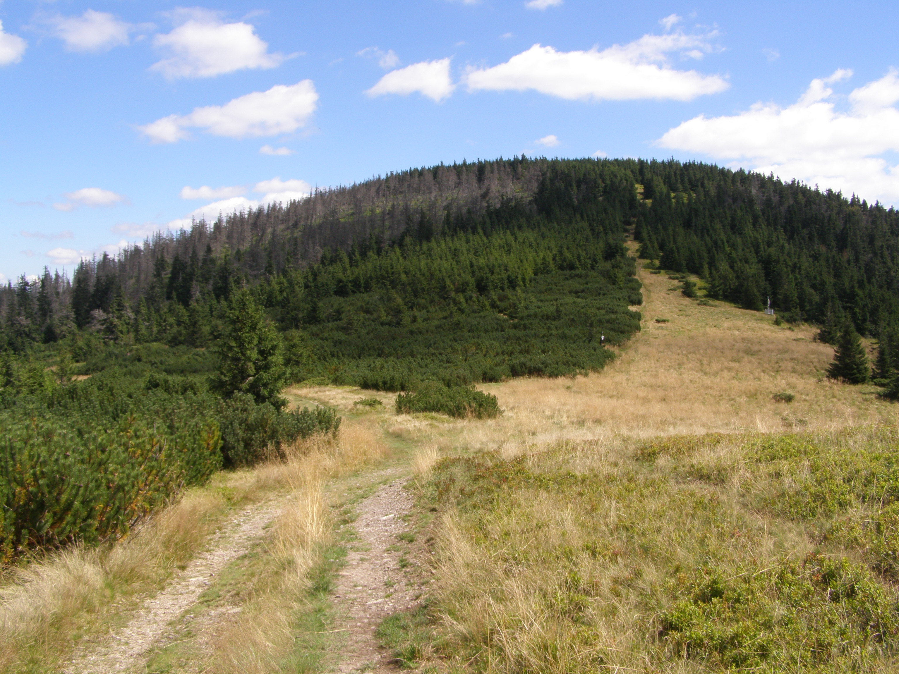 Nízké Tatry, Kráľovohoľské Tatry, západní strana vrcholu Andrejcová (1520 m)